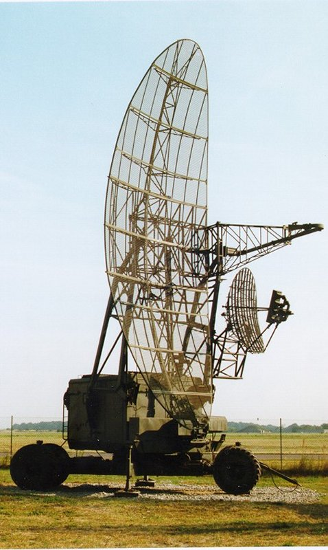 älteres Radargerät (Nato designator „Odd Pair”) als Exponat auf dem Fliegerhorst Trollenhagen bei Neubrandenburg.